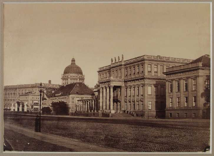 Unter den Linden mit dem Palais des Prinzen Friedrich Wilhelm von Preußen, der Kommandantur und dem Berliner Schloss, 1857